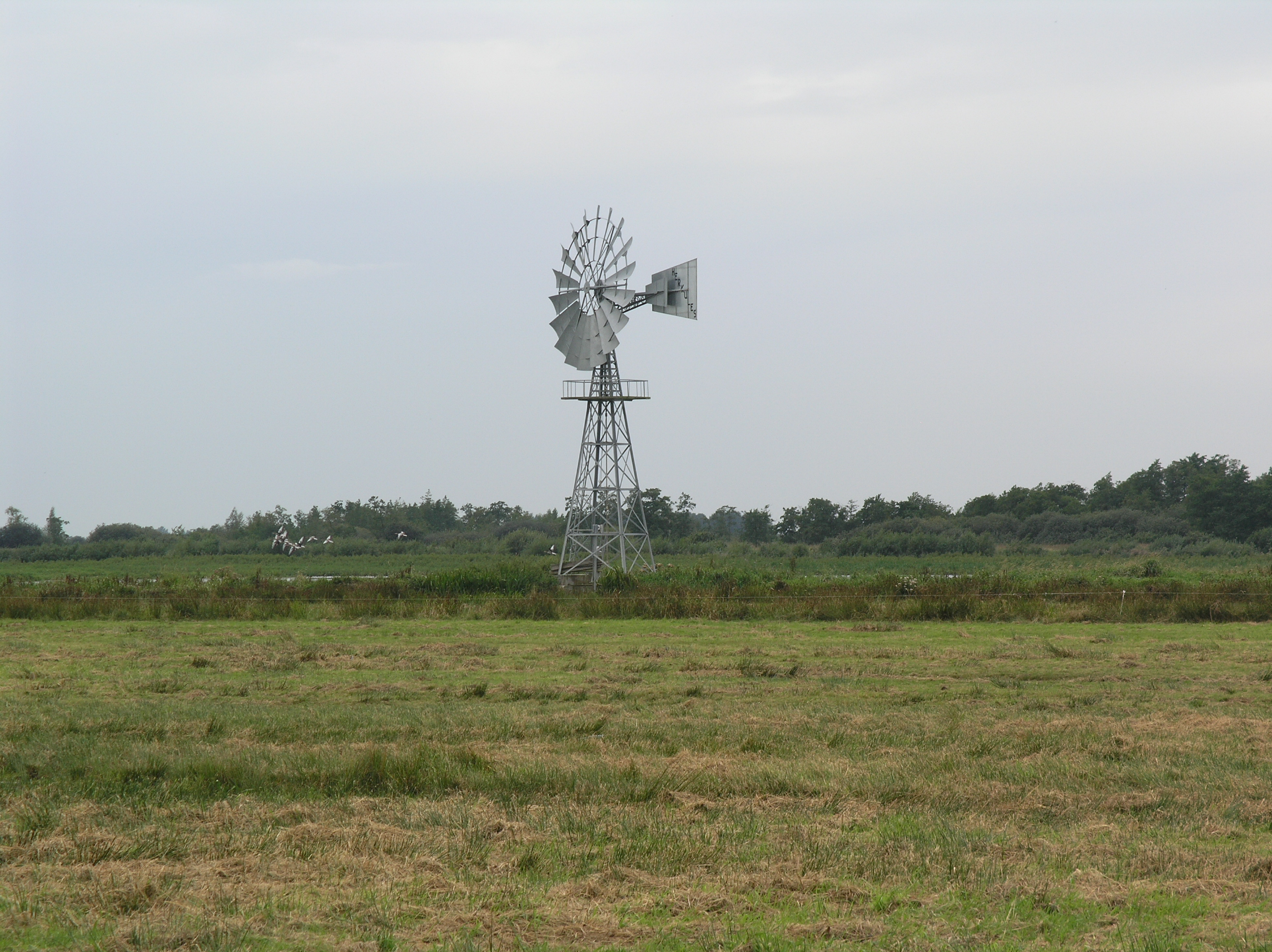 Oudega Windmotor Jan Durkspolder